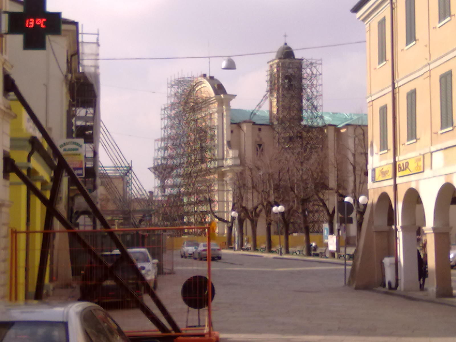 Centro Storico Poggio Rusco Terremoto